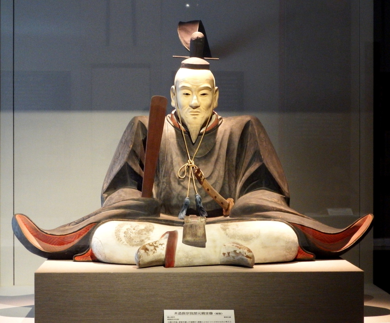 長宗我部元親像のレプリカ